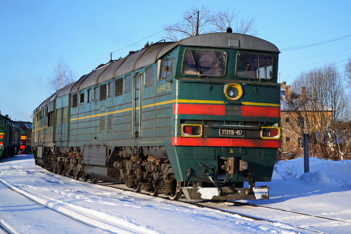 С завода поступил в депо Кочетовка (Юго-Восточной ж. д.); в 90-х гг. — передан в депо Волховстрой (Октябрьской ж. д.); 2000 г. — передан в депо Дно В 2008 г. секция А подменена секцией 2ТЭ116-570А, секция Б подменена секцией 2ТЭ116-045А КР Воронежский ТРЗ 03.2001 г. КР Воронежский ТРЗ 2008 г.